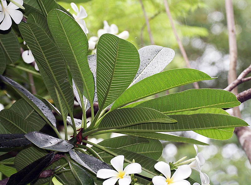 White Frangipani Plumeria obtusa in Kolkata, West Bengal, India.